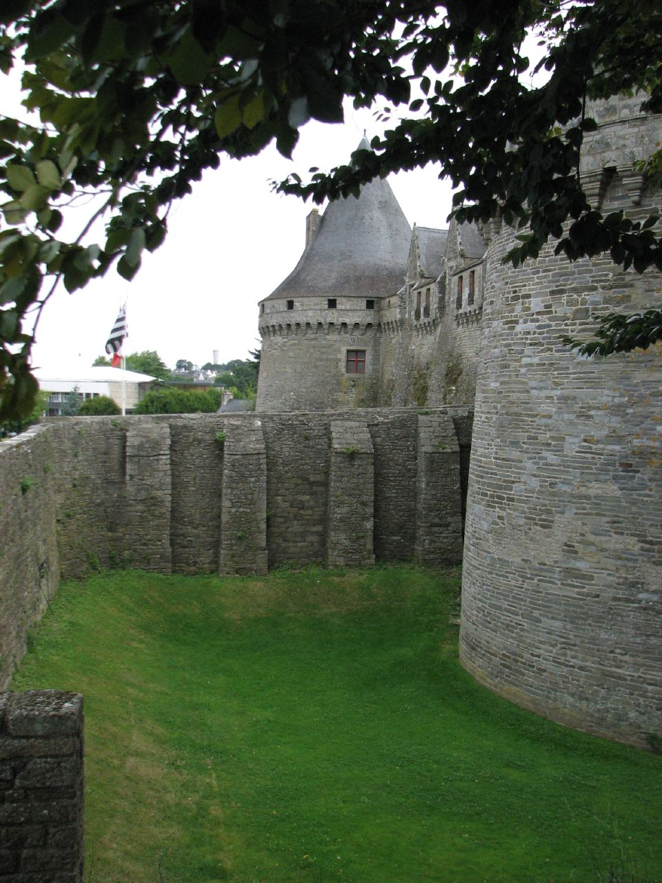 Le château des Rohan à Pontivy : les douves